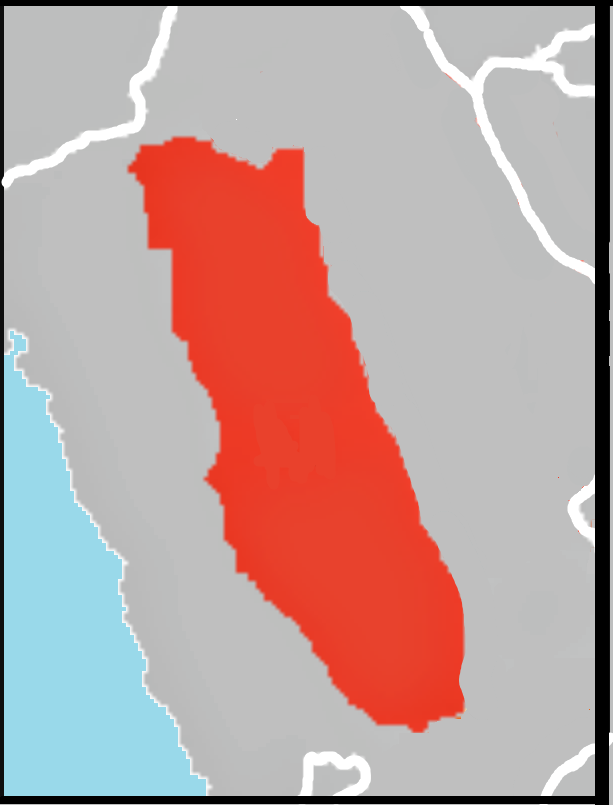 extensión del quechua de waylas